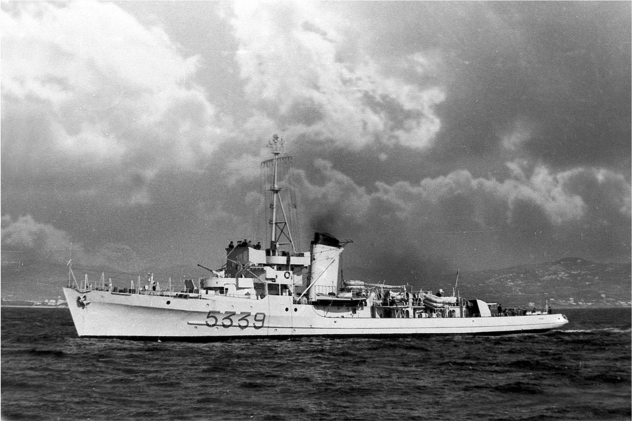 La corvetta Daino nel 1955